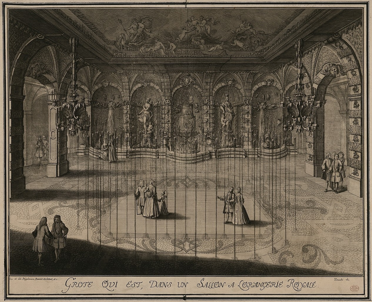 Grottensaal im Erdgeschoss des Mathematisch-Physikalischen Salons im Zwinger zu Dresden. Kupferstich von Lorenzo Zucchi. Titel: "Grote Qui Est, Dans Un Sallon A LOrangerie Royale". Maße: 58 x 44 cm.